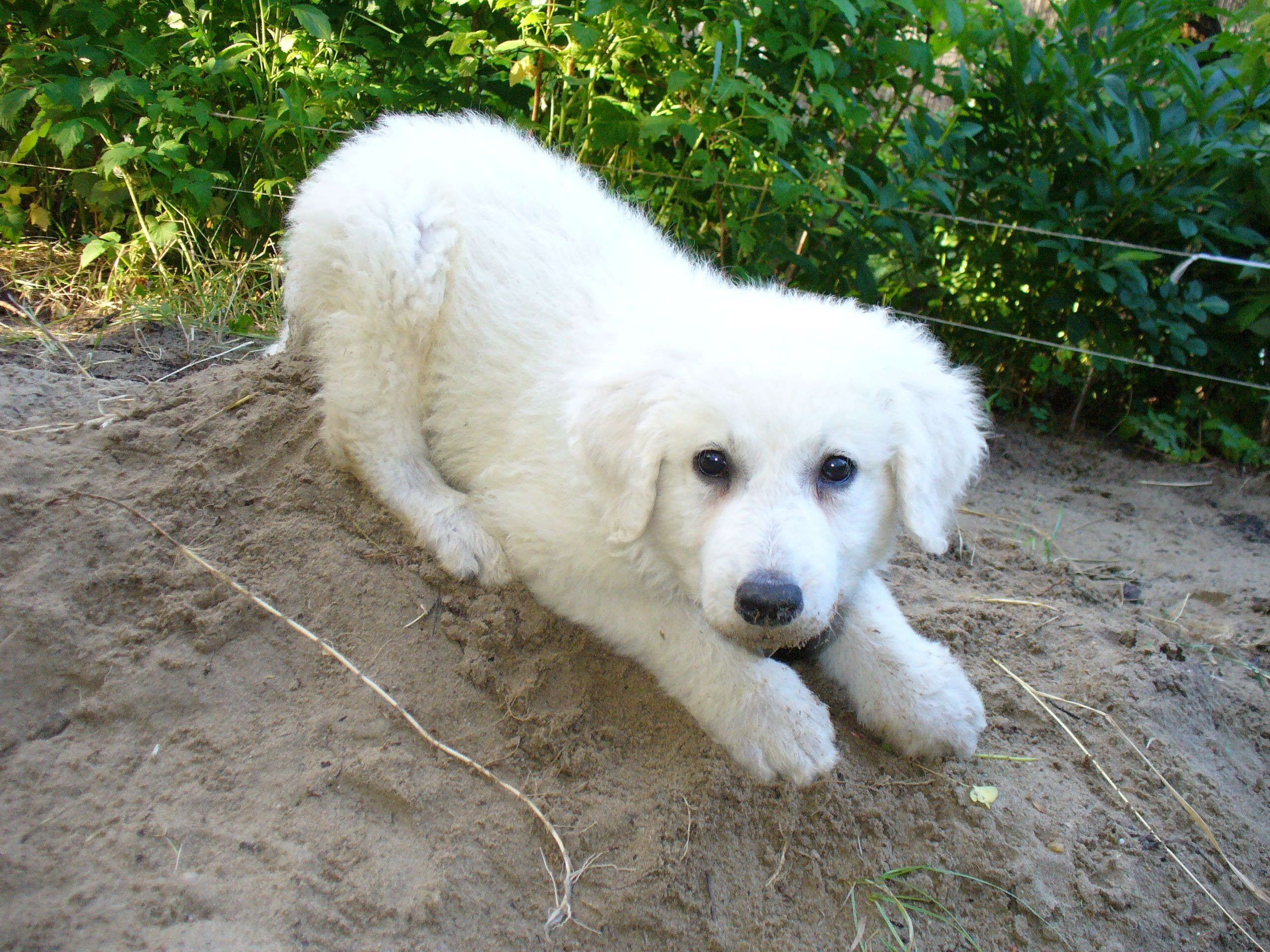 Kilenchetes kuvasz kutya